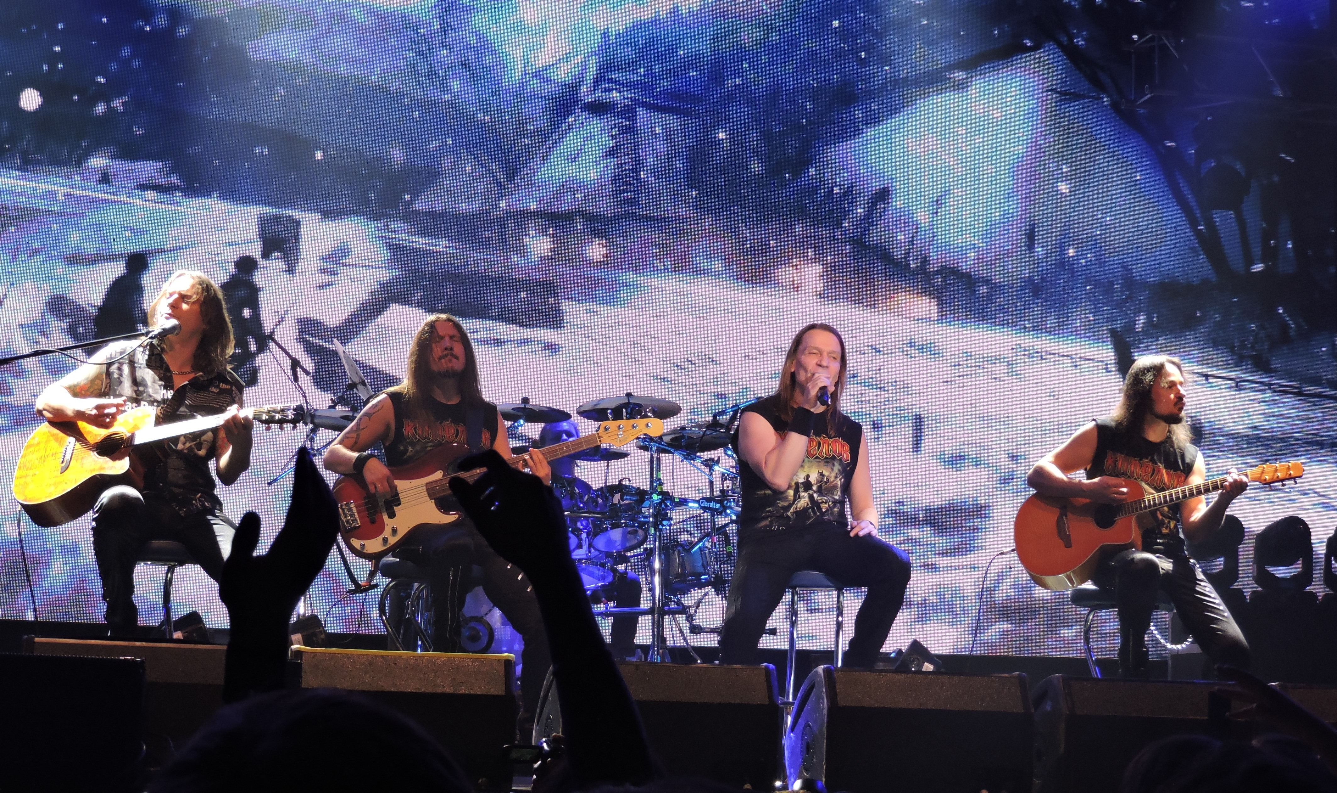 Акустическая вариация песен Кипелова